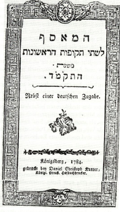 Ha-Me'assef nebst einer deutschen Zugabe. Titelblatt 1784. Herausgeber Isaac Euchel. Drucker Daniel Christoph Kanter